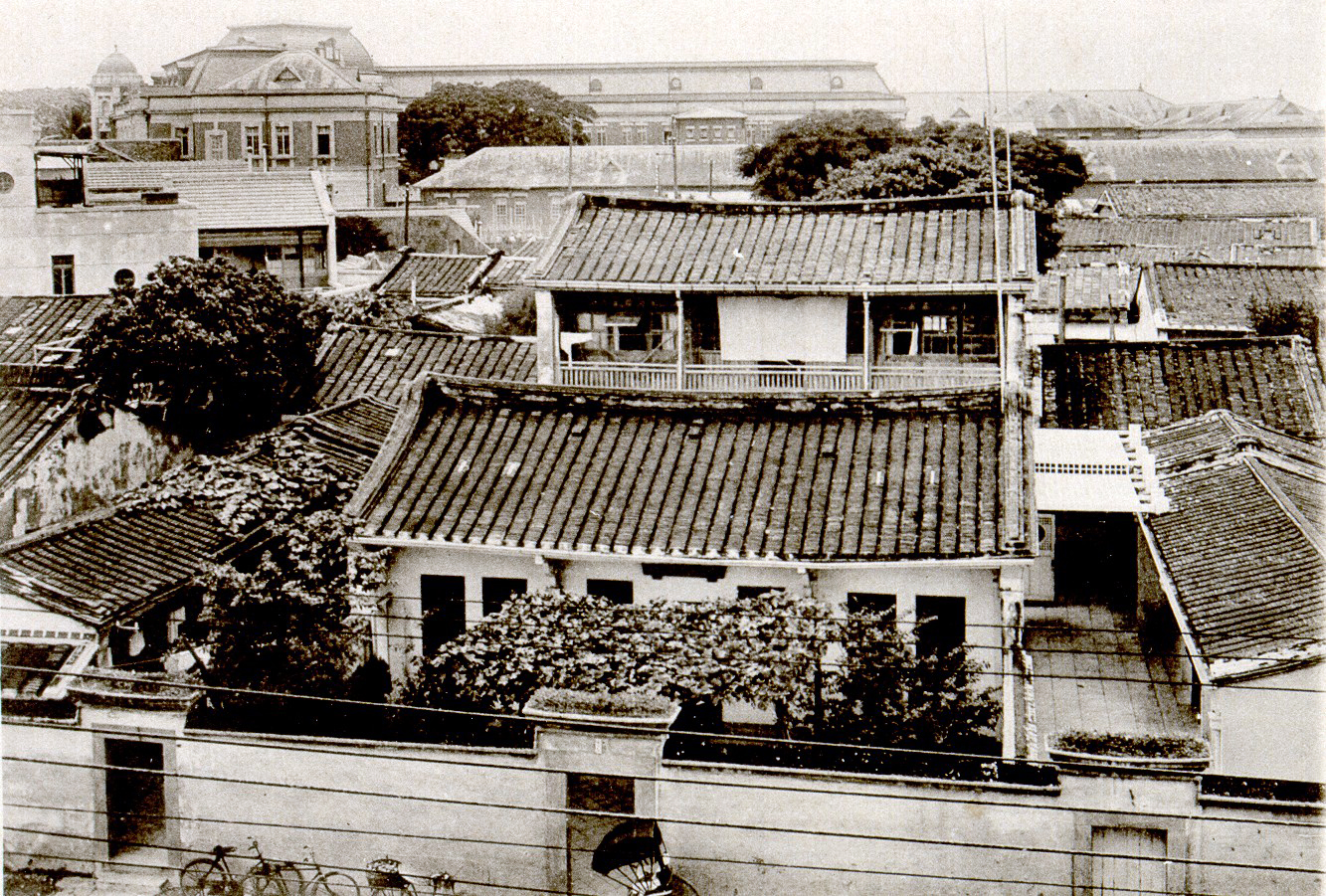 臺南安海街御舍營所位於現今台南市忠義路與中正路口，為北白船宮能久親王曾待過的住所